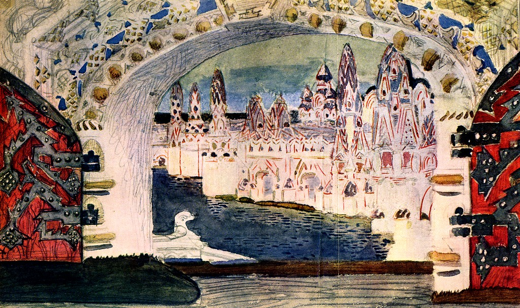 Врубель М.А. - Город Леденец. Эскиз декорации к опере "Сказка о царе Салтане". 1900